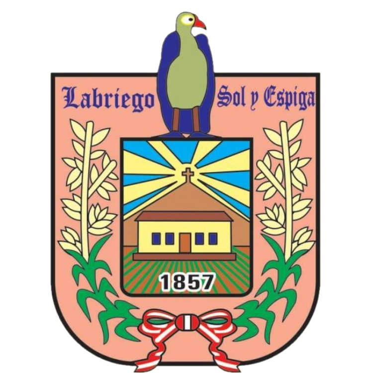 Escudo distrital de Morropón, provincia de Morropón, Región Piura.